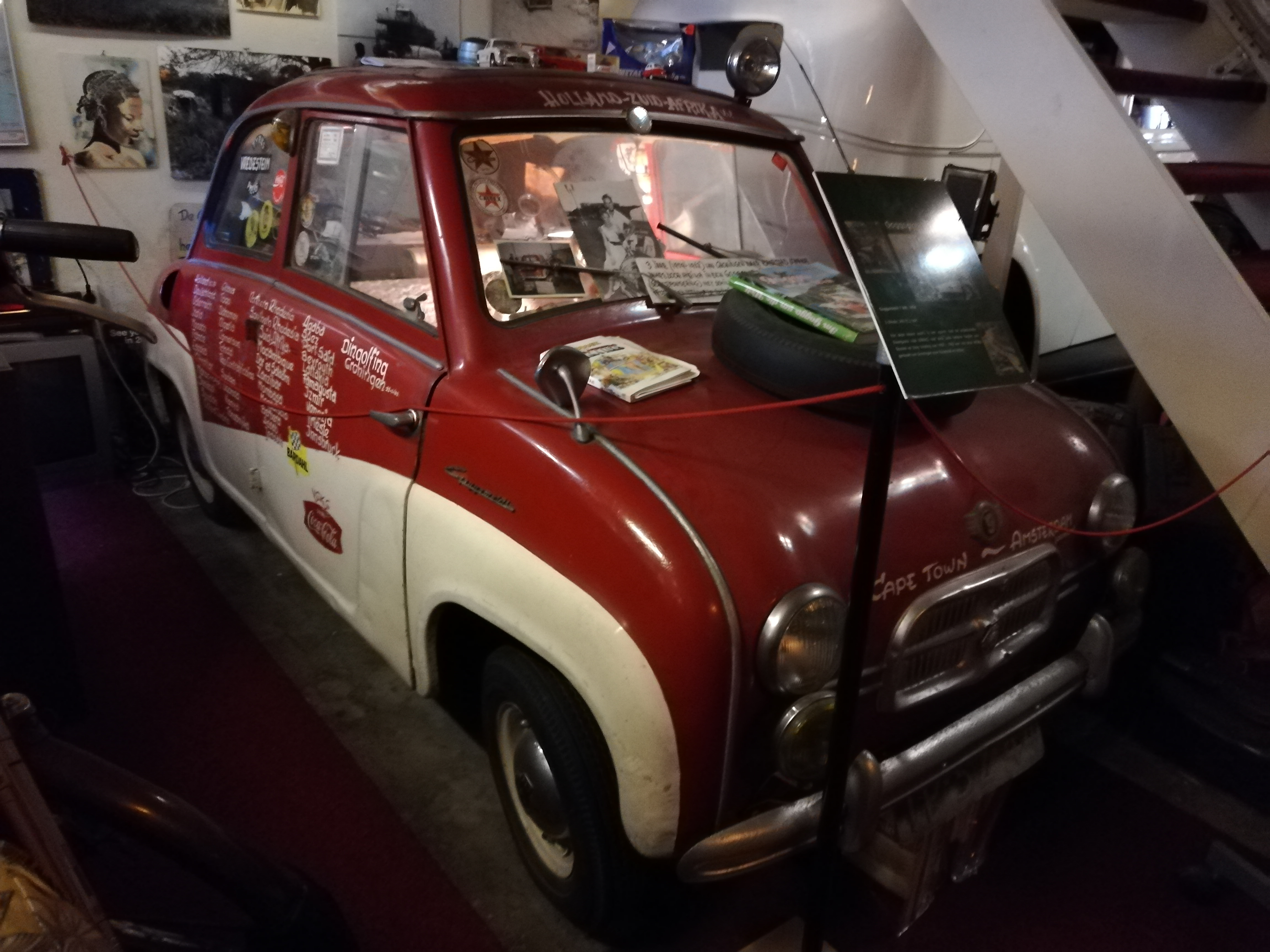 De Goggomobil T300 waarmee twee Nederlanders vanaf 1959 een wereldreis maakten van Groningen naar Kaapstad, tentoongesteld in 't Andere Museum in Leeuwarden.